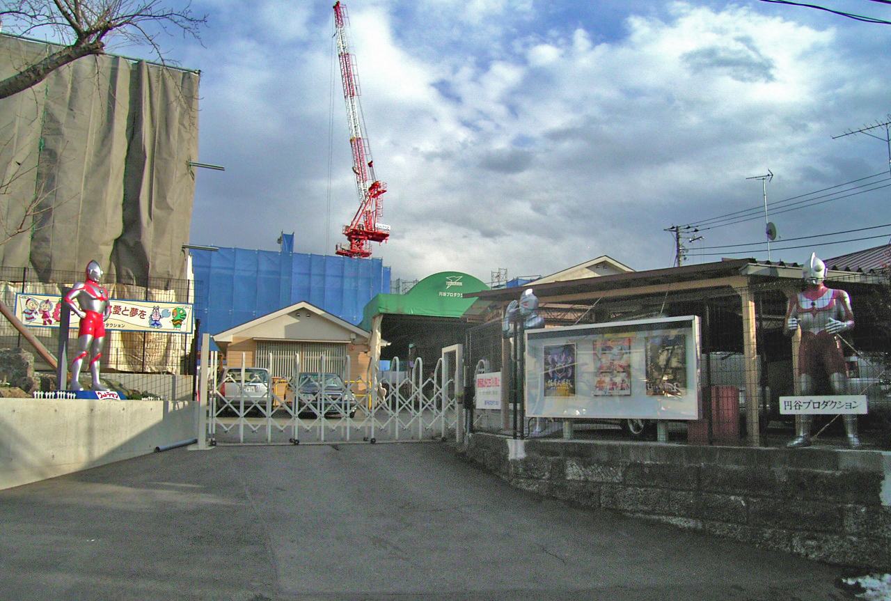 “Tsuburaya Productions” Kinuta, Setagaya-ku, Tokyo 東京都世田谷区砧にかつて存在した円谷プロダクション旧本社社屋。